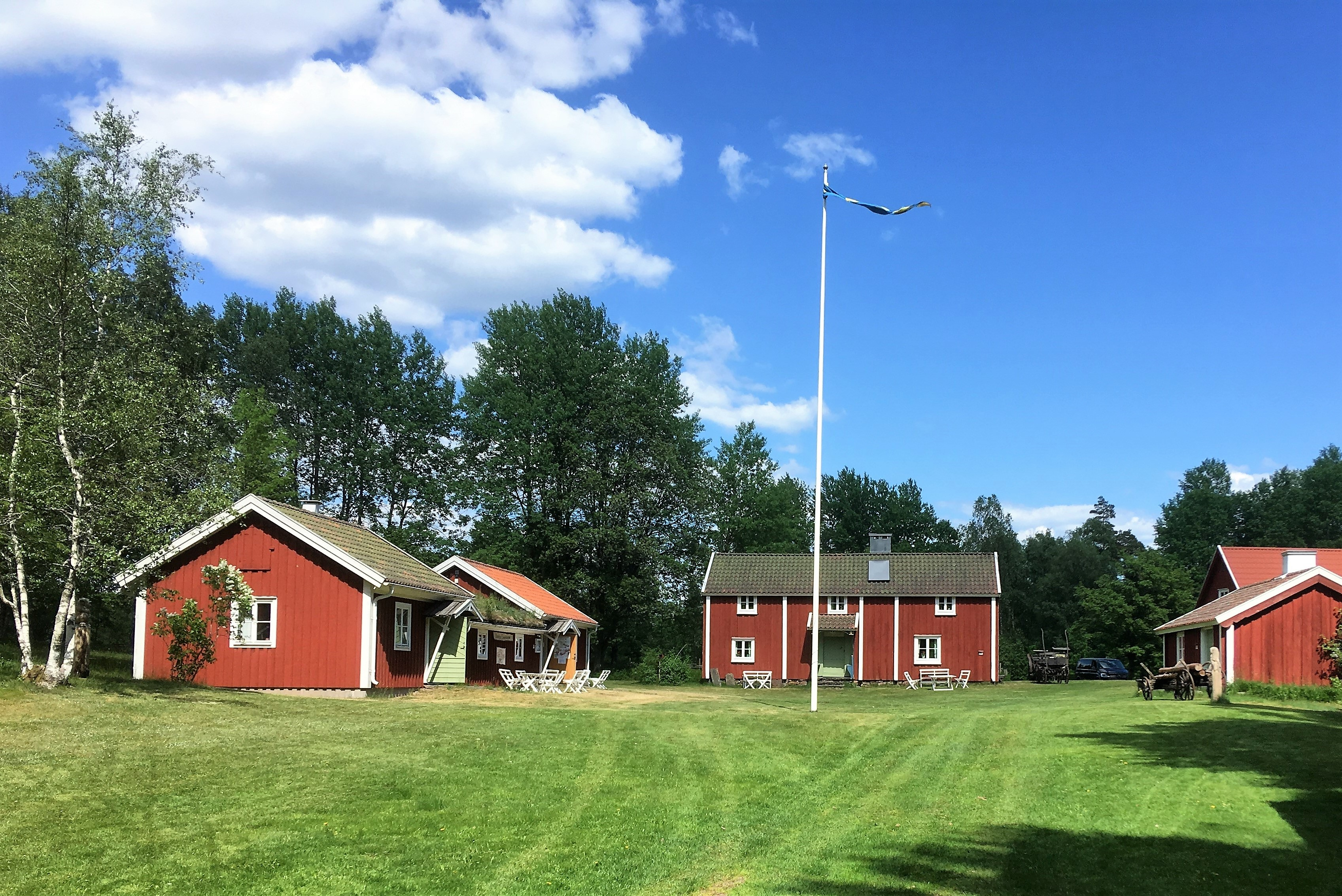 Unnaryds Hembygdsgård